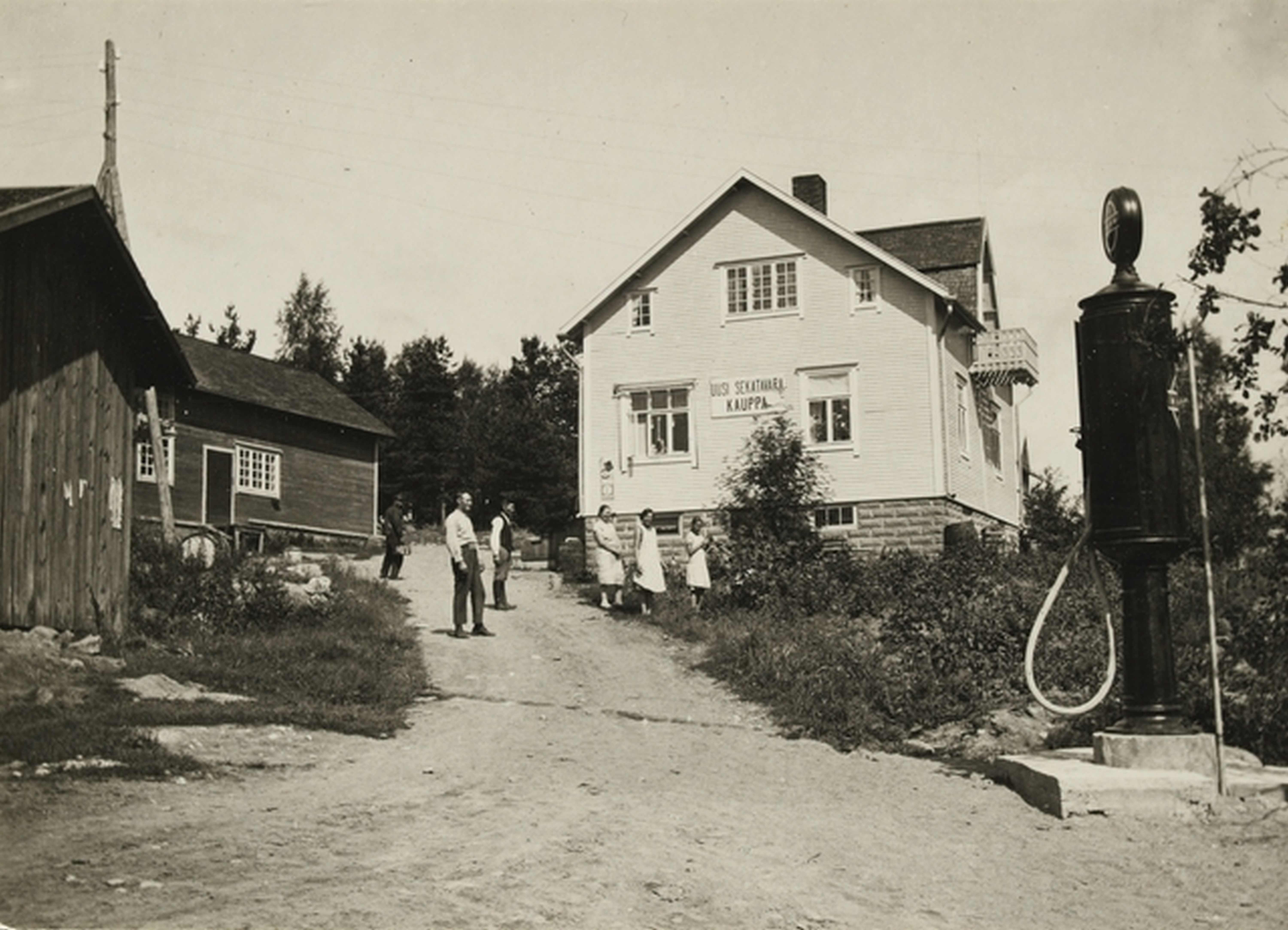 Uusi sekatavarakauppa, Kokkilan ranta; Angelniemi